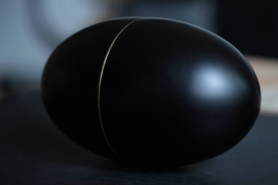 presea del premio Fénix